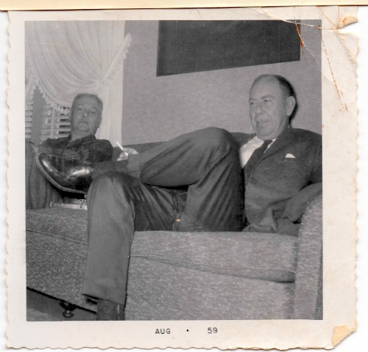 Чӑвашла: Fred Gipson 1959 visiting Sand Springs Oklahoma